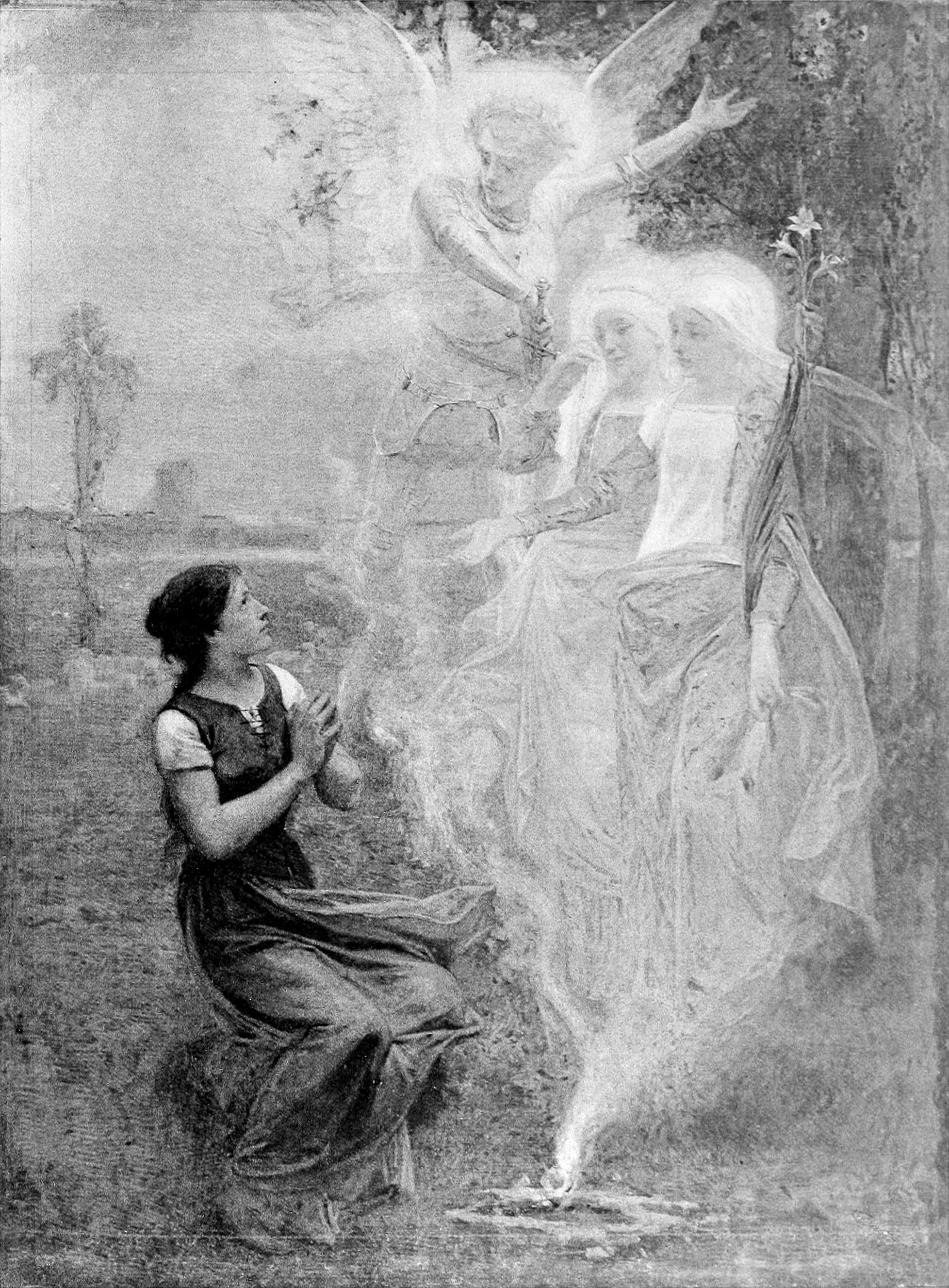 Jeanne d'Arc et les voix célestes